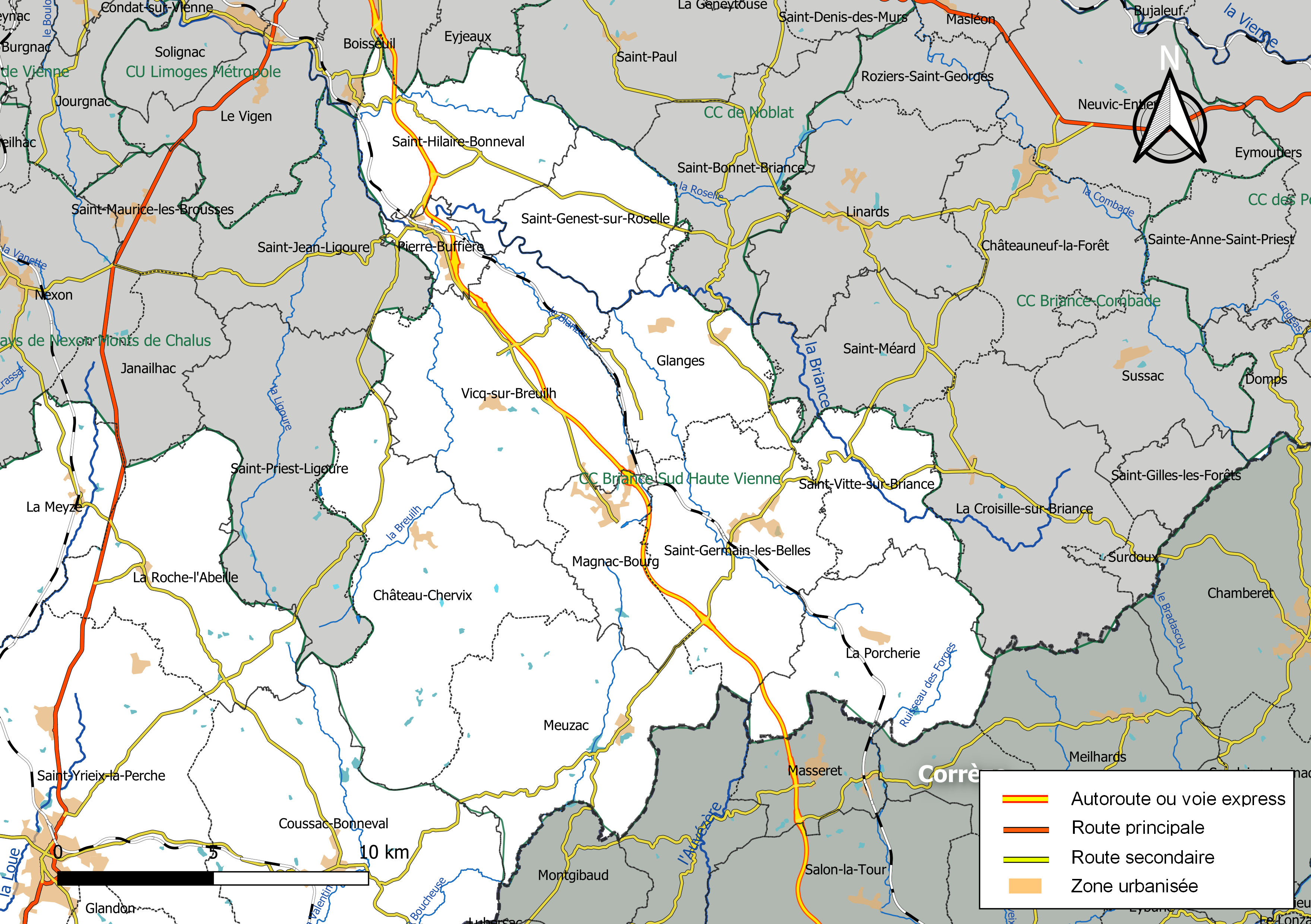 Carte géographique de la Communauté de communes Briance Sud Haute-Vienne, département de la Haute-Vienne, France. Composition au 1er janvier 2019.